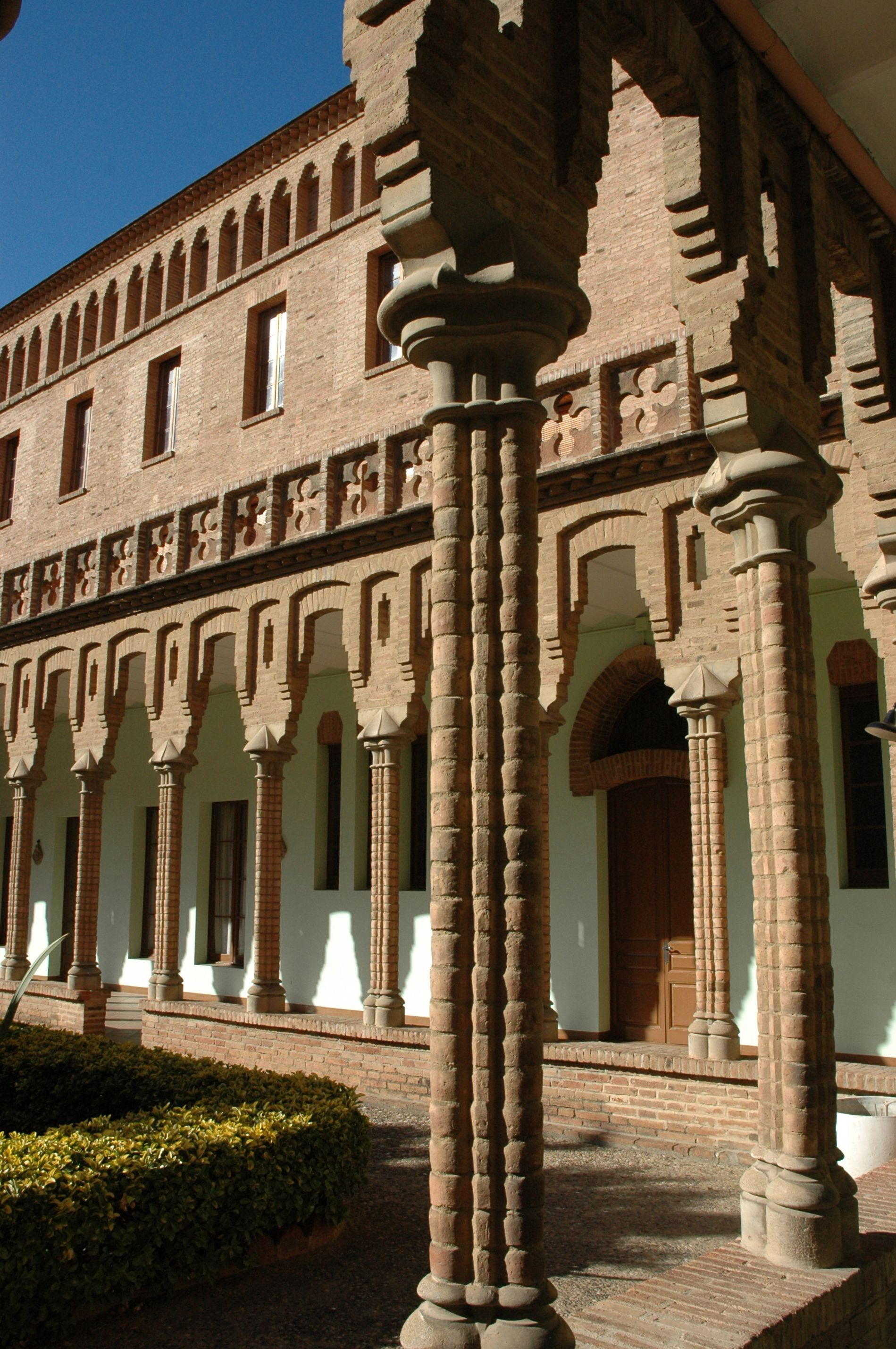 Santa Maria de Valldonzella - Claustre